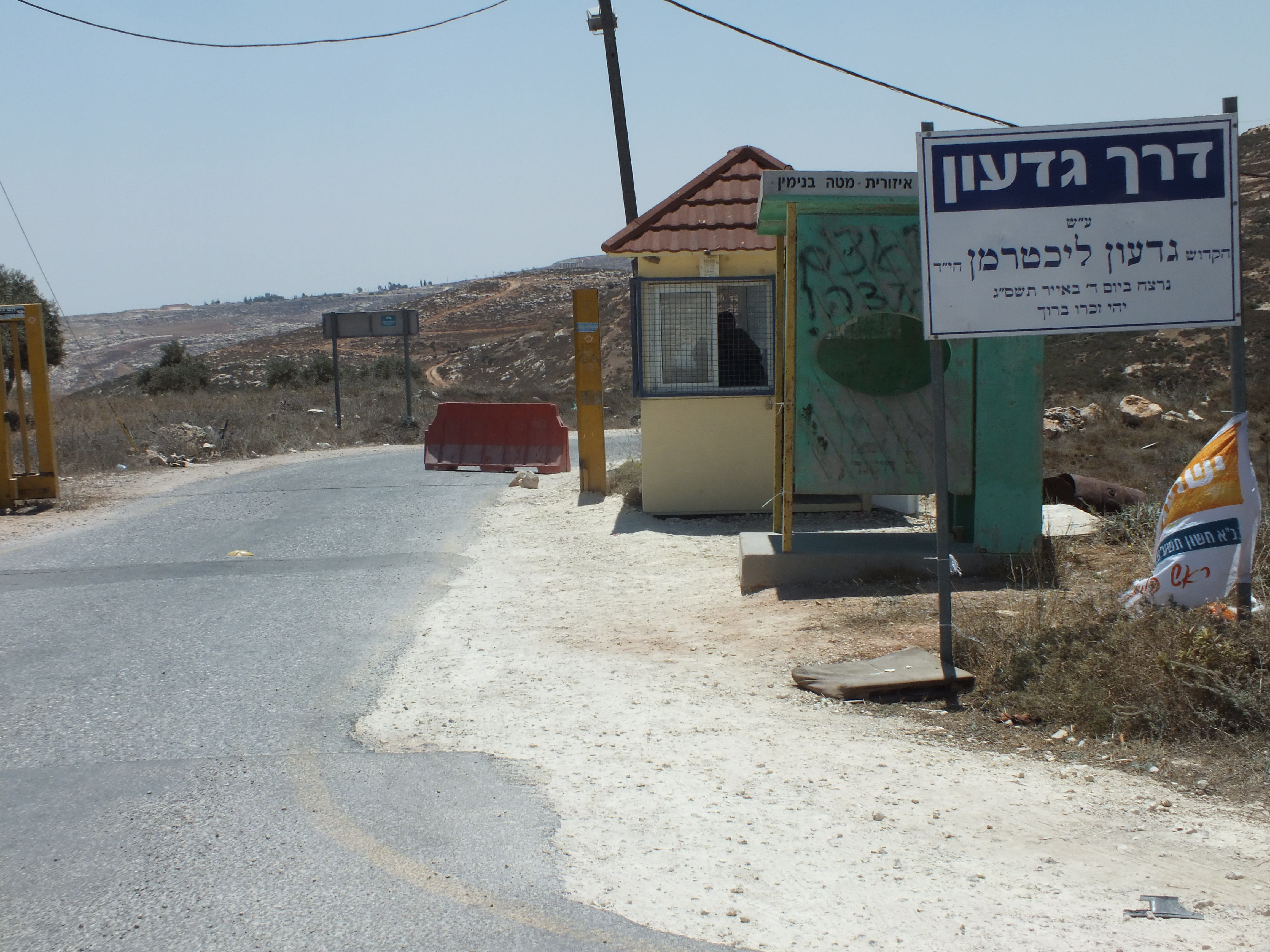 דרך גדעון, מצומת הכניסה לעדי עד